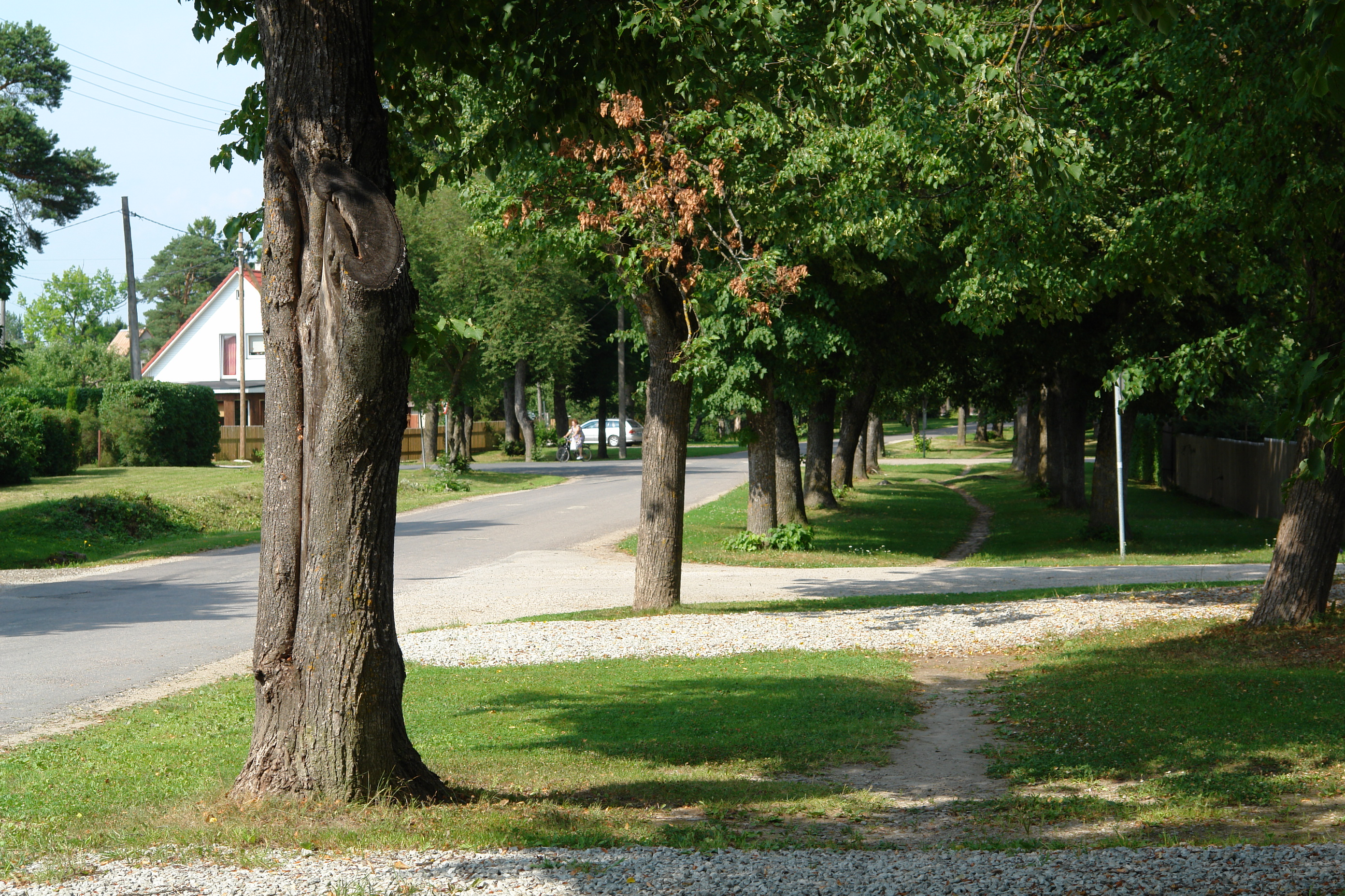 Pilt Aruküla Jaama puiestee pärnaalleest, mille istutamise initsiaatoriks peetakse Eesti Vabariigi peaminister Kaarel Eenpalu, kes 1930-ndatel Arukülas oma talu pidas.